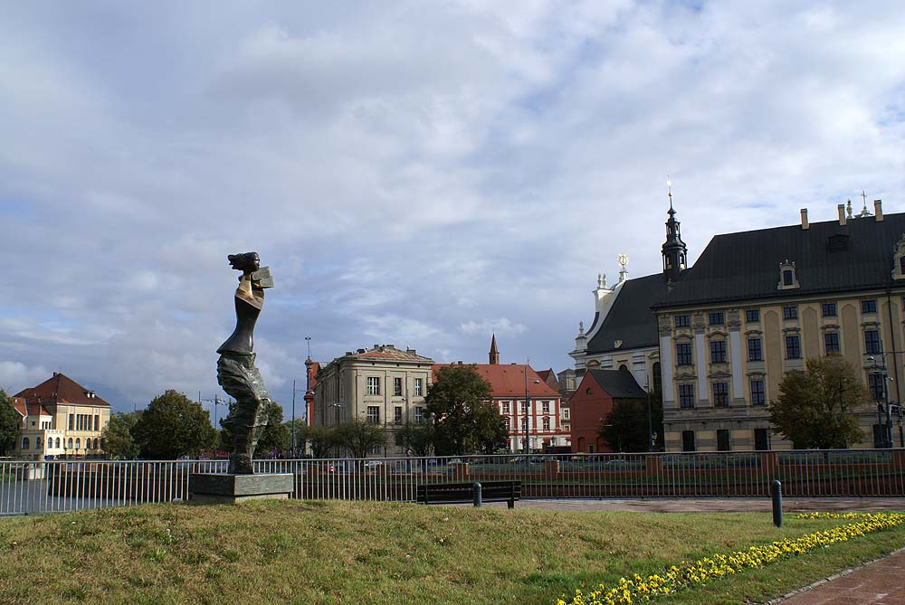 Wrocław - rzeźba Powodzianka na moście Uniwersyteckim.